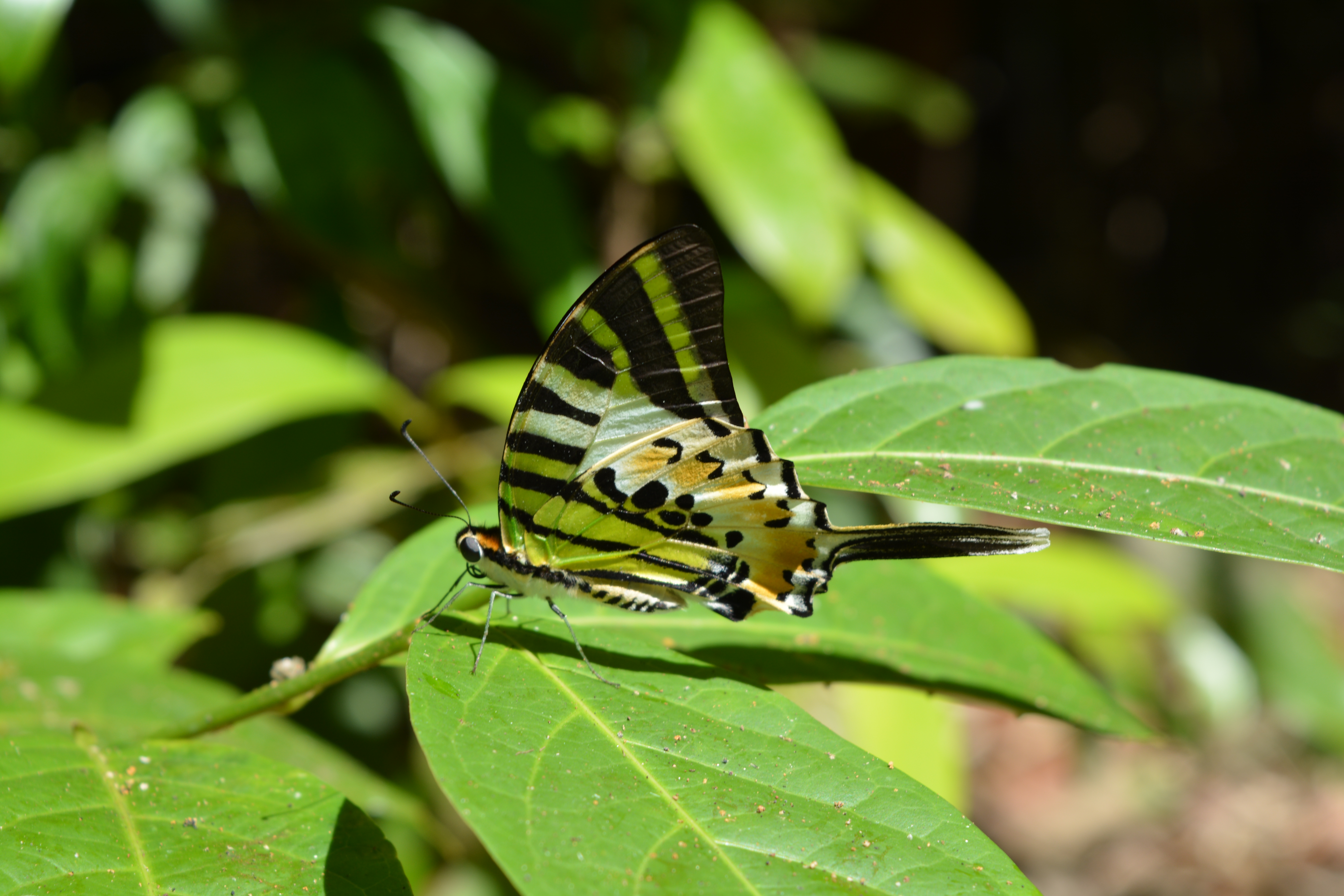 Photos taken from Kannavam Reserve Forest and Peravoor